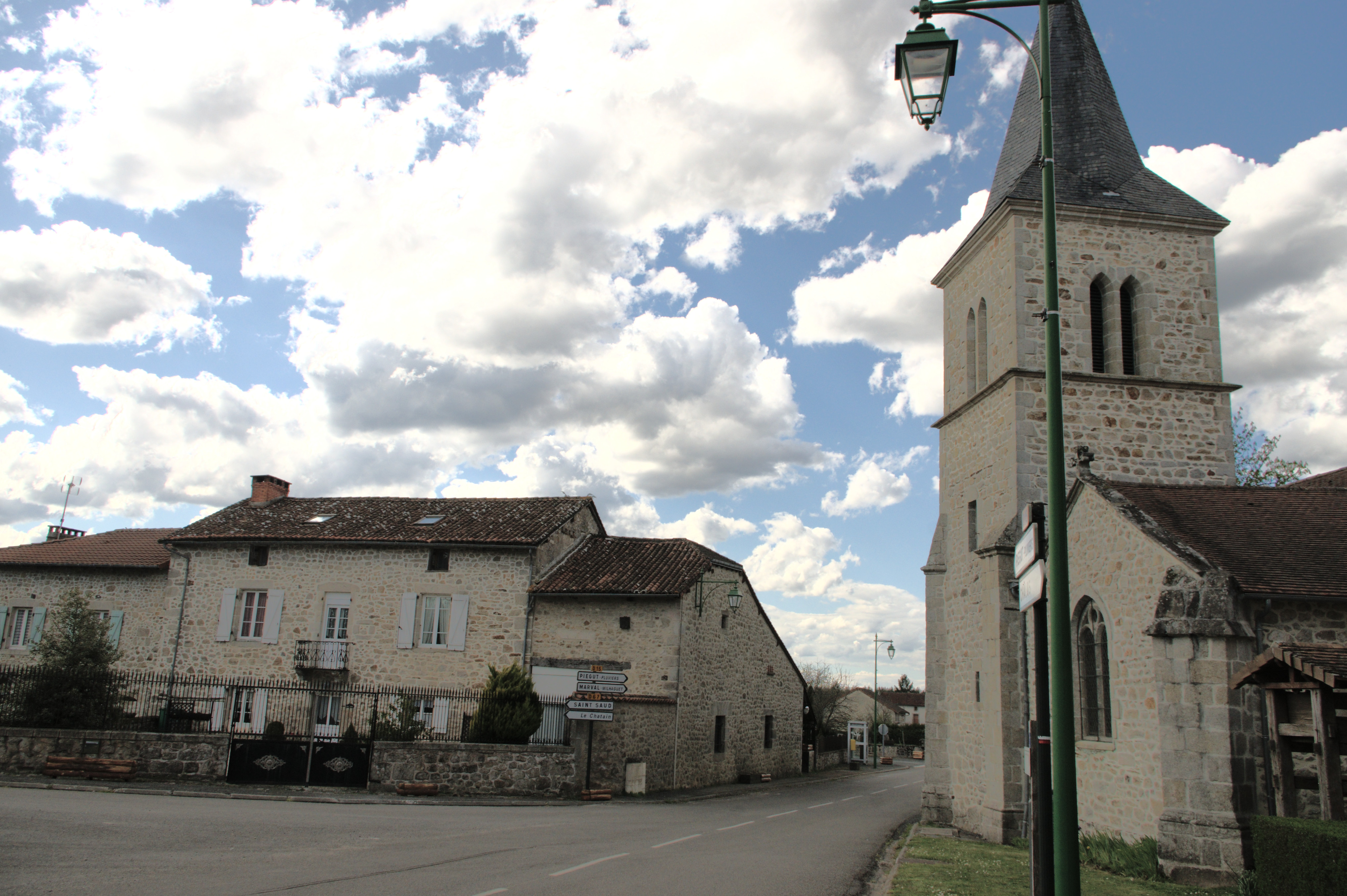 Pensol, Haute-Vienne, France.